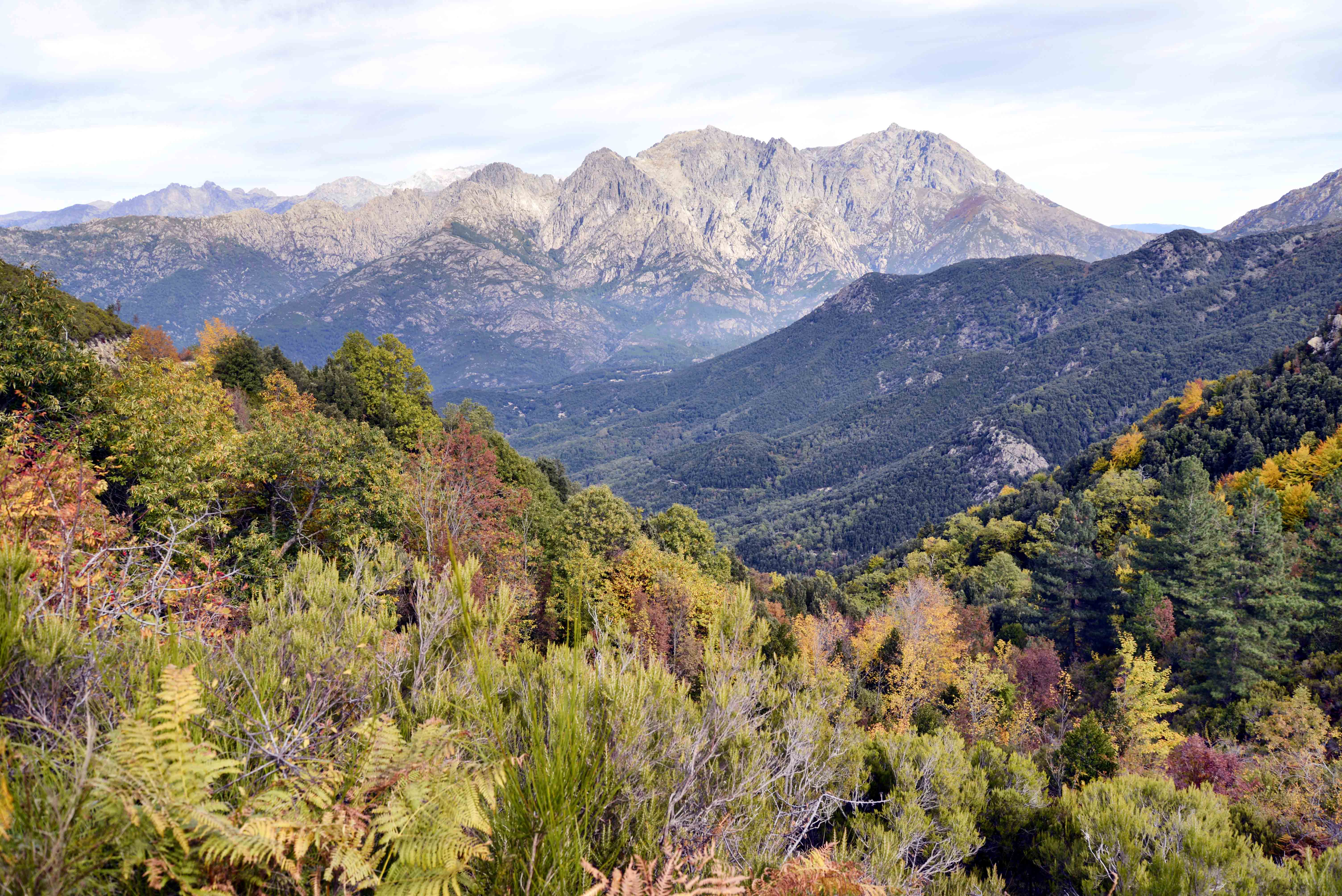 Tavera, Gravona (Corse) - Vue depuis le col de Scalella de la ligne de crête comportant des sommets remarquables : Pointe Laccione (1982 m), Pointe Migliarello (2254 m), Pointe Cancellone (2120 m) et le Monte d'Oro (2389 m), contrefort de la chaîne montagneuse centrale de l'île, qui sépare la vallée de la Gravona de celle du Cruzzini au nord.